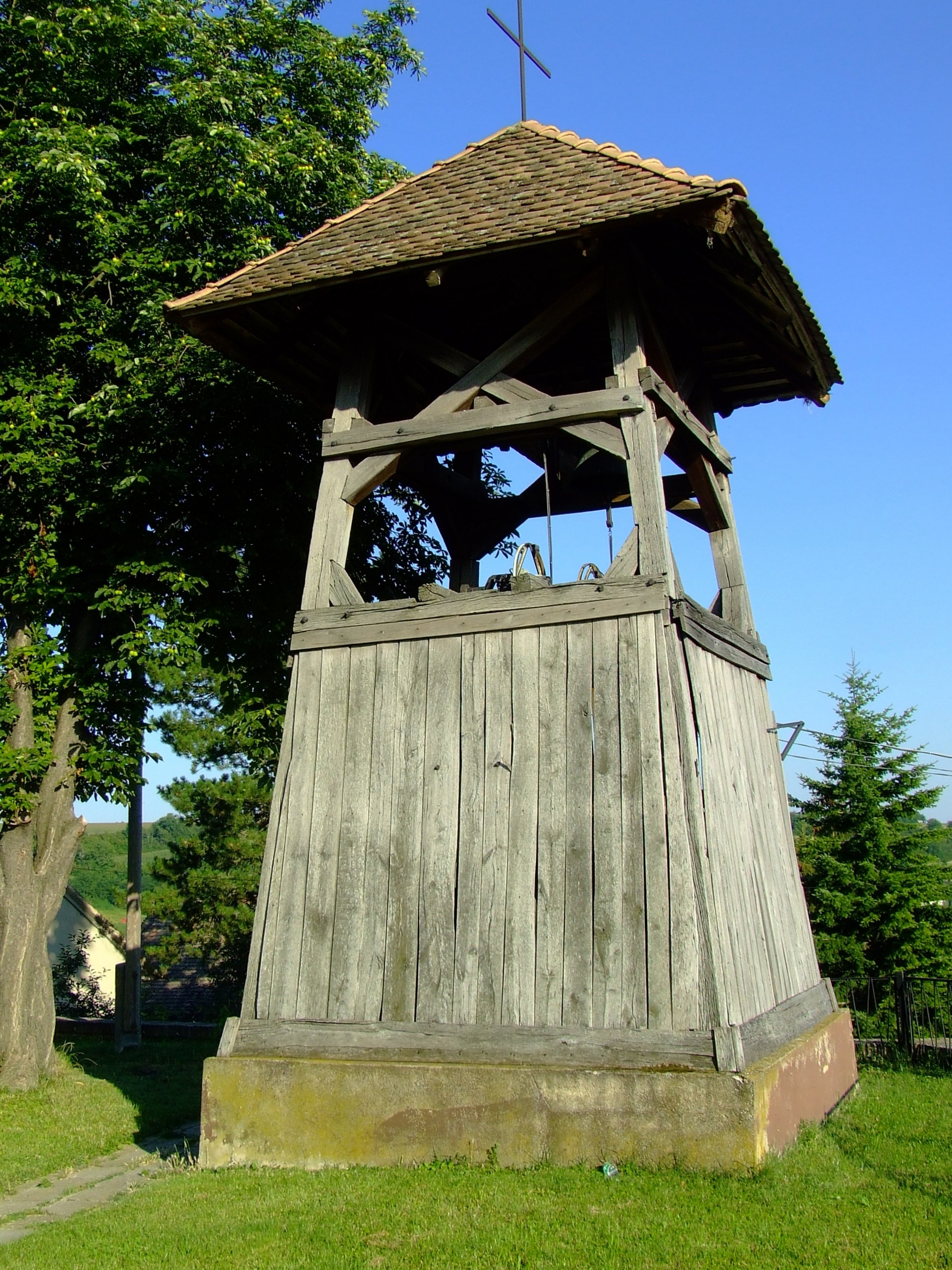 19. századi fa harangláb az erzsébeti (Baranya megye) Árpád-házi Szent Erzsébet-templom mellett